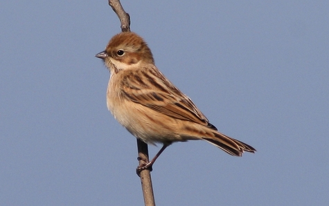 Bruant de Pallas (Emberiza pallasi), Heuksando, Corée du Sud.